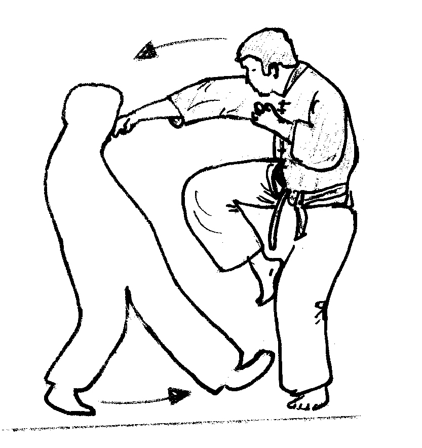 contre_cobra1.jpg